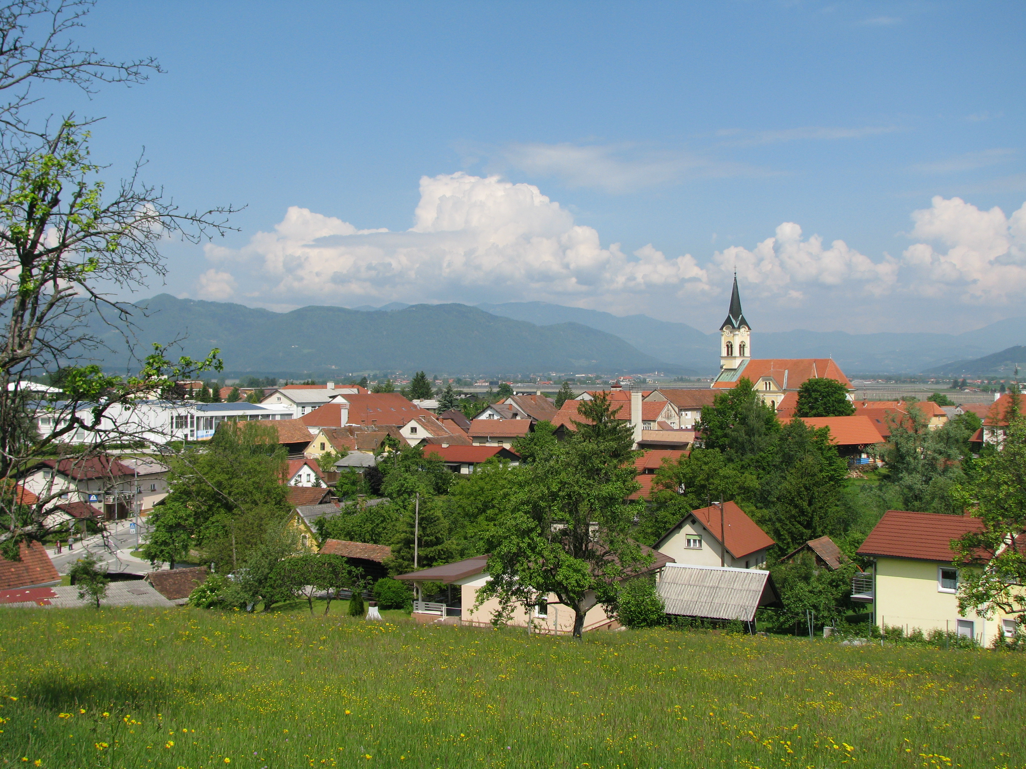 Prebold, pogled na kraj s pokopališča